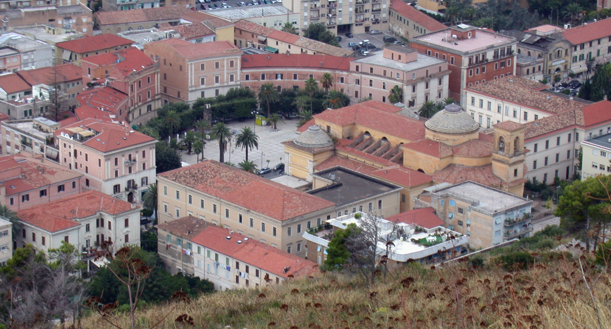 Terracina (provincia di Latina, Lazio, Italia), panorama della città bassa (piazza Garibaldi) dal tempio di Giove Anxur.